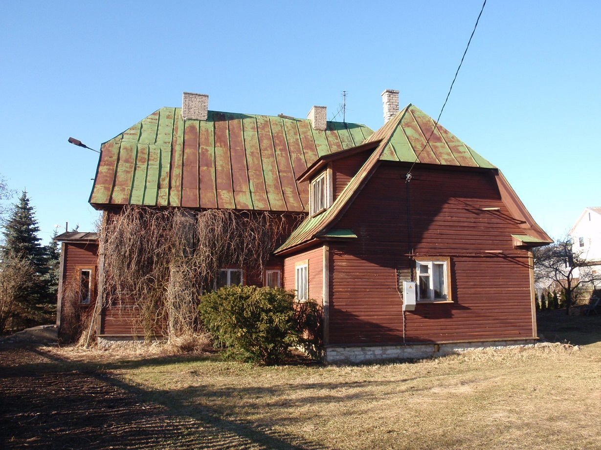 Endine Betaania palvela Mähe aedlinnas